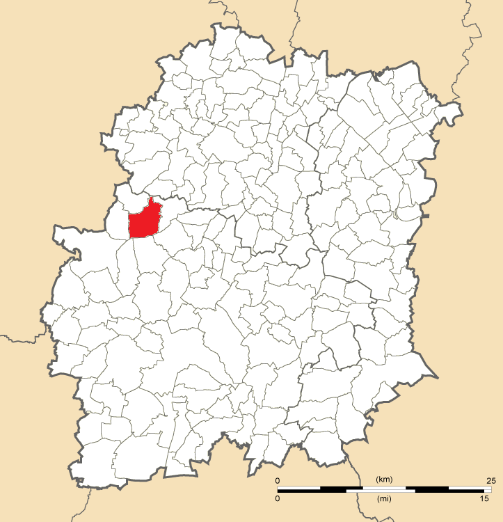 Carte de position du Val-Saint-Germain en Essonne (91)